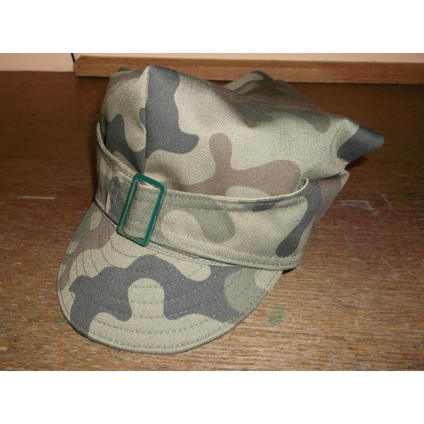 Rogatywka